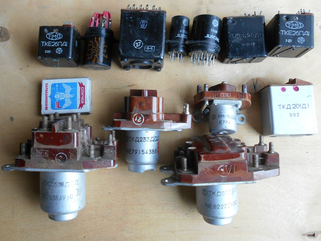 Авиационные реле и контакторы